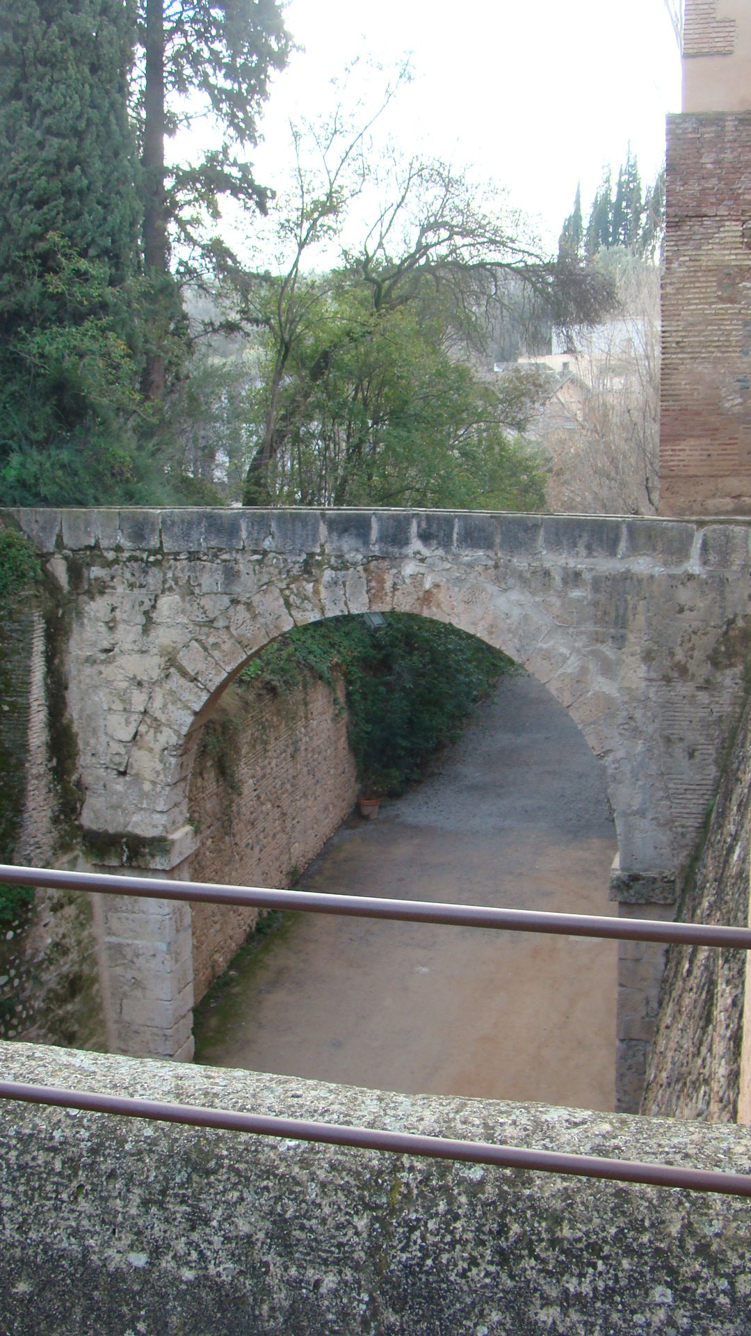 Vista del acueducto de entrada de la Acequia Real a la Alhambra